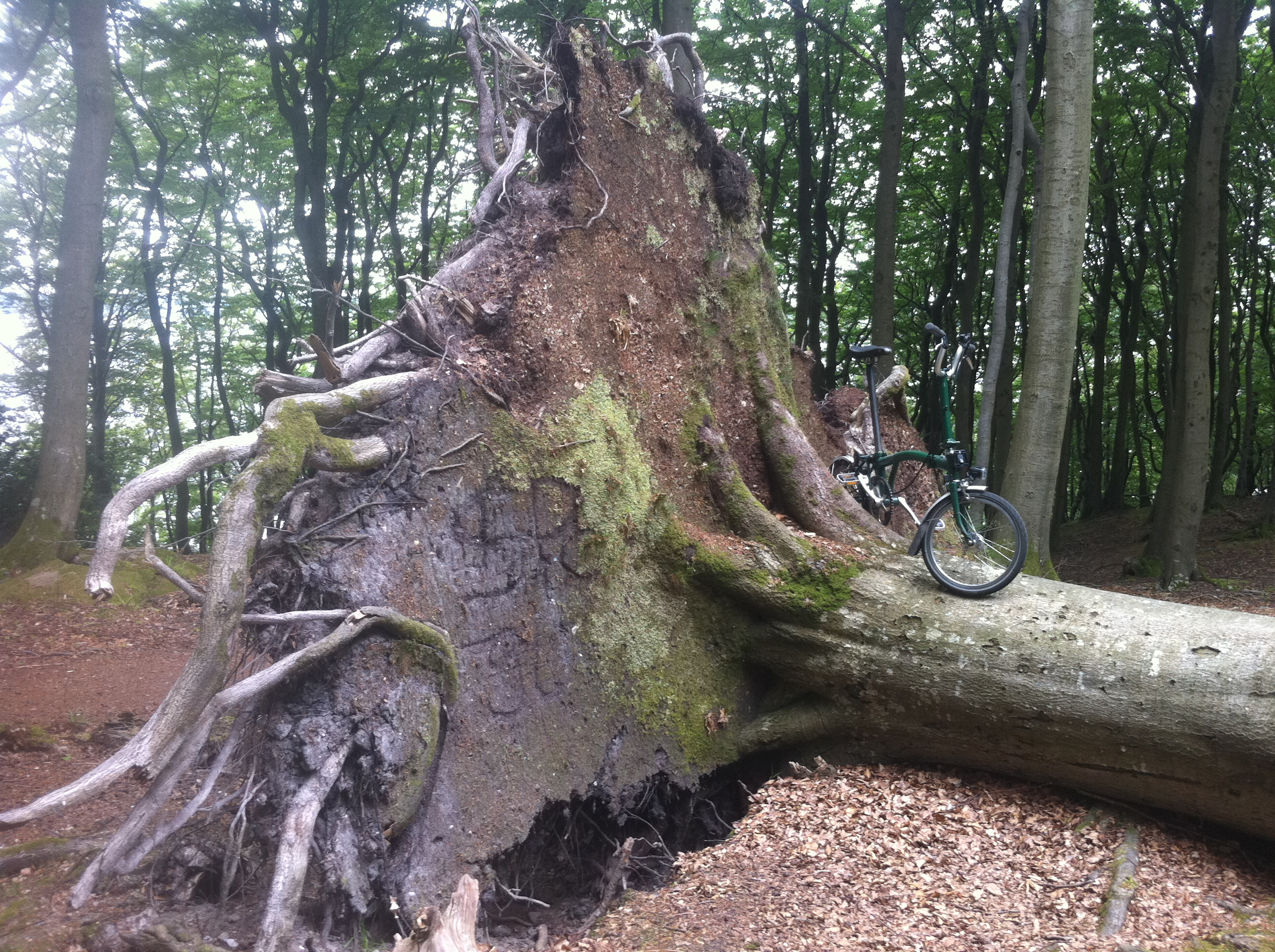 Windwurf im Ruheforst Glücksburg